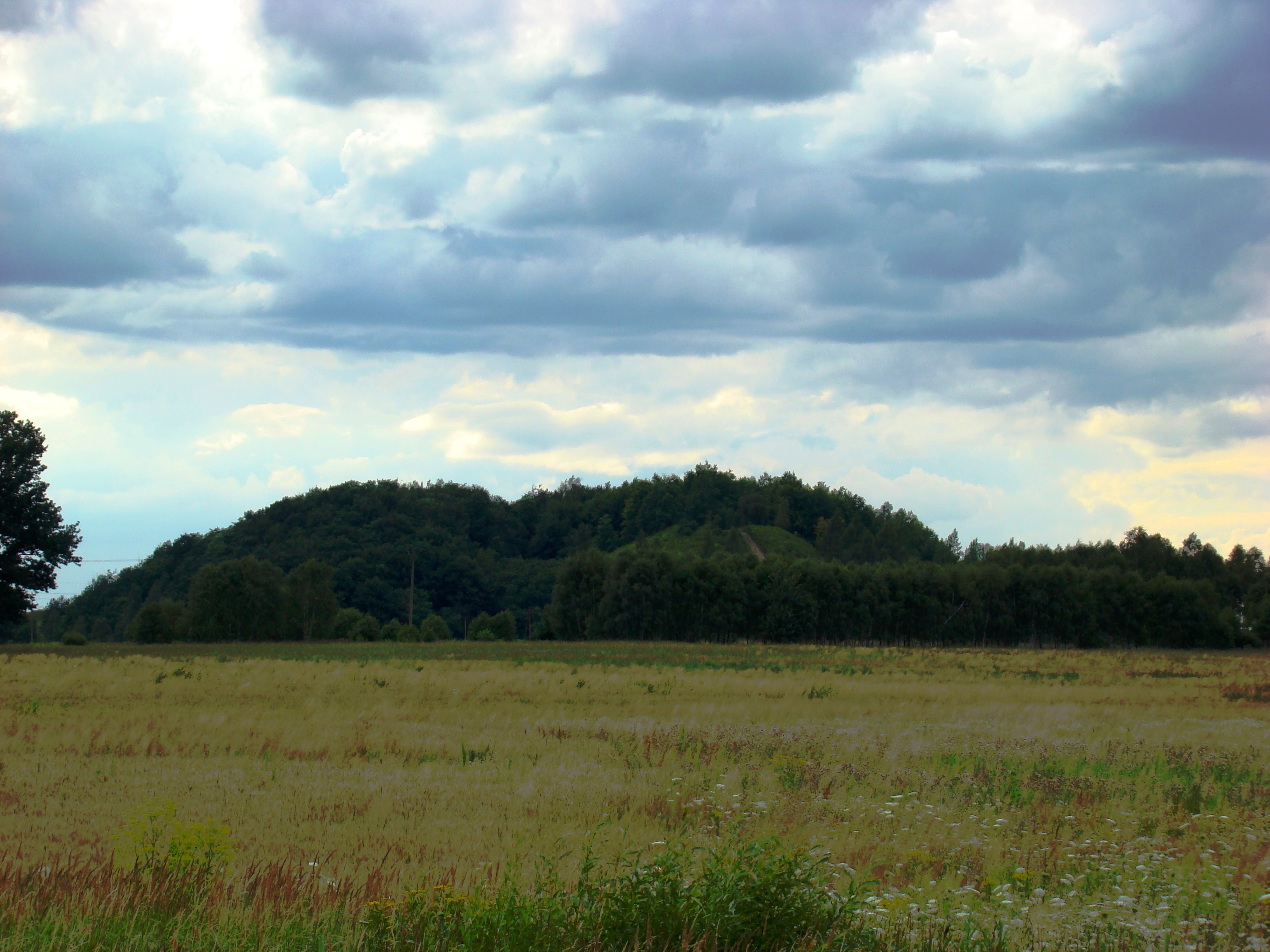 Hałda kopalni rud żelaza "Tadeusz" w Hucie Starej A